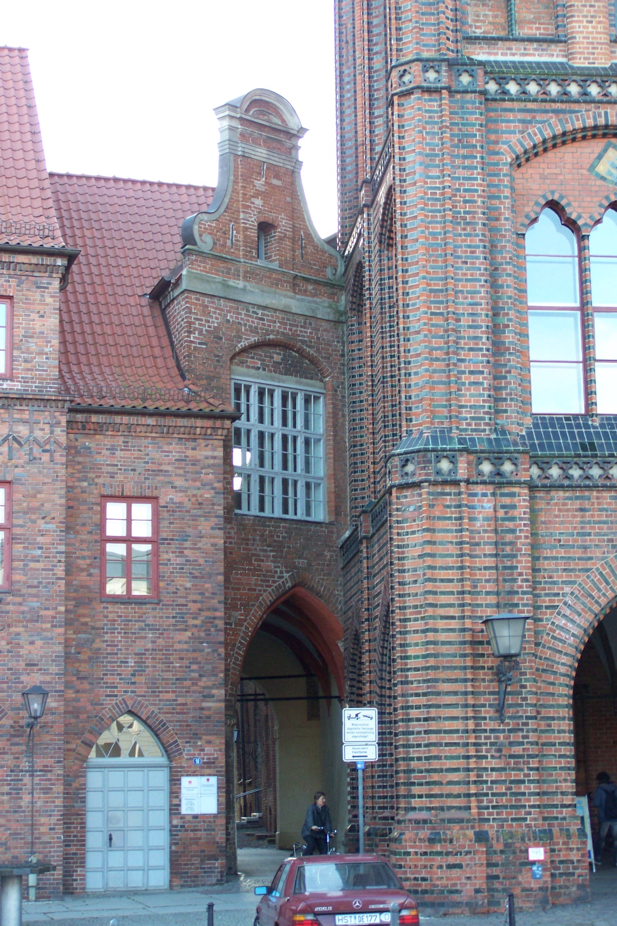 Stralsund, Alter Markt, Zwischenbau am Rathaus (2008-10-10)